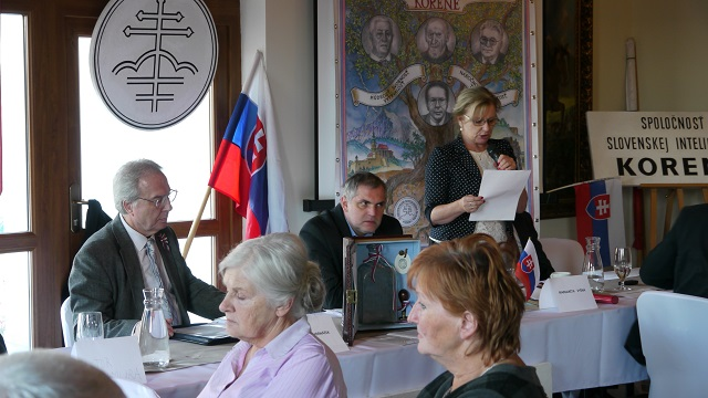 Hornacek a Michelko